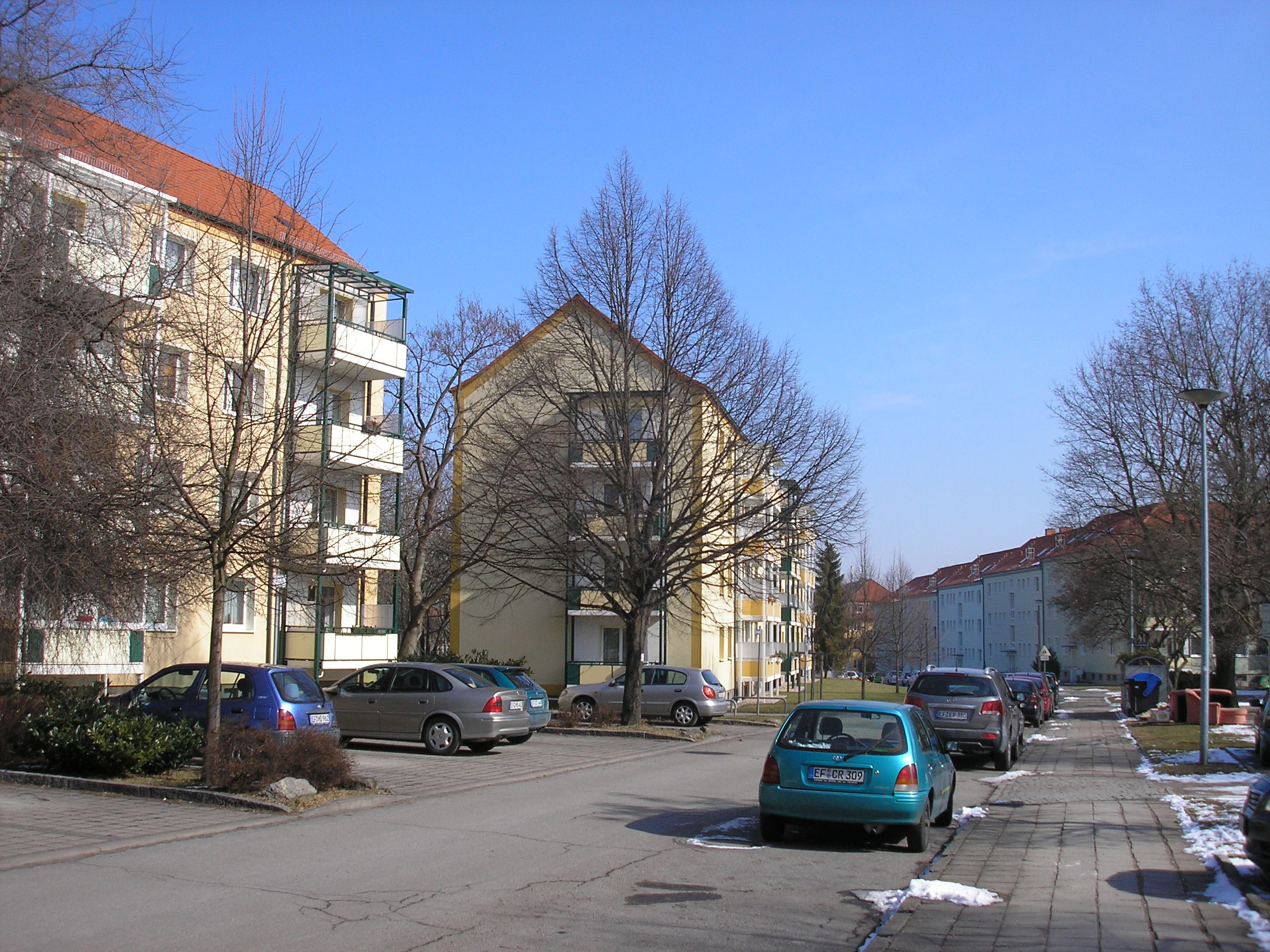 Im Wohngebiet Borntal in Erfurt.